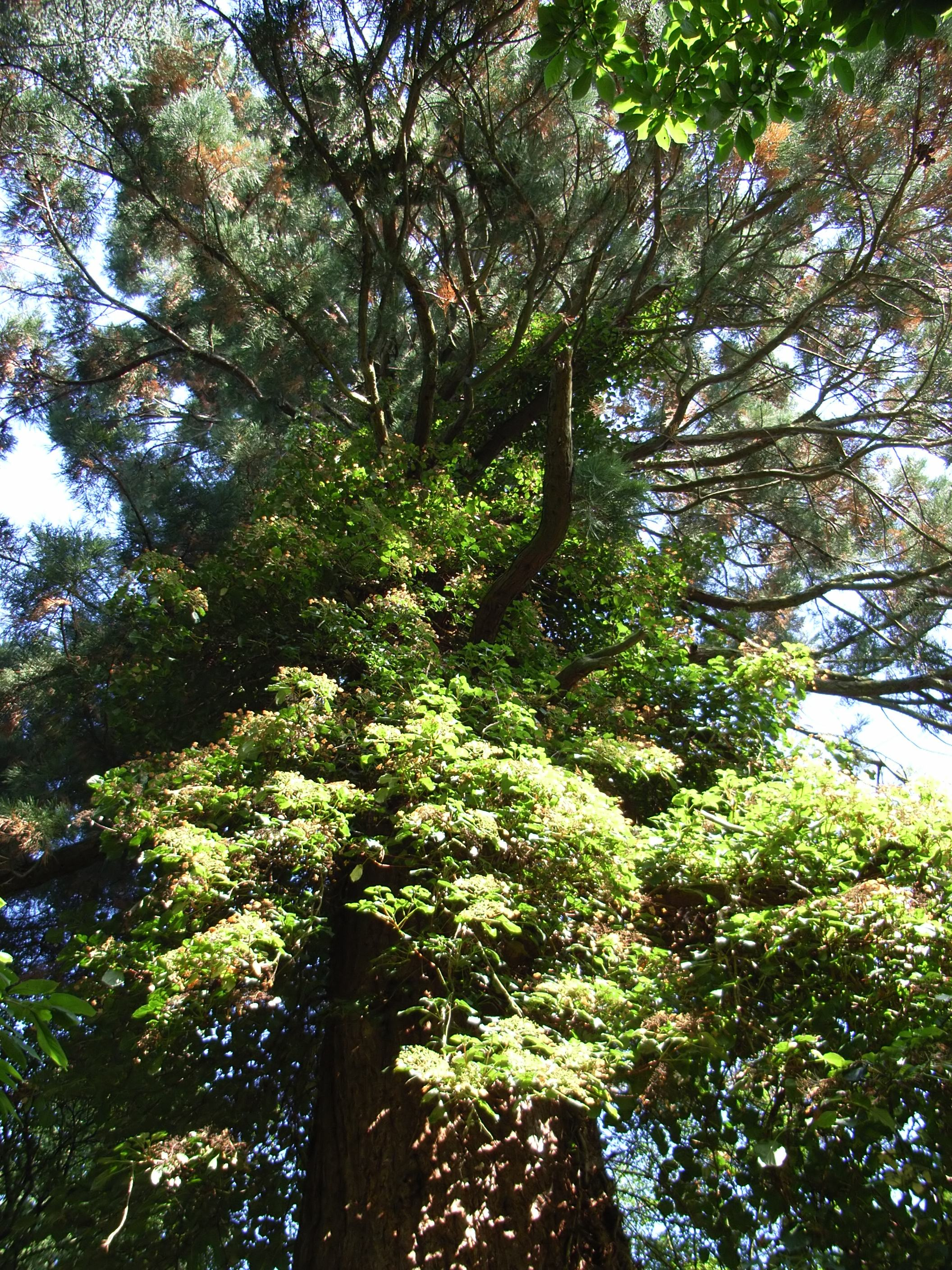 Sequoiadendron giganteum, Hydrangea anomala subspec. petiolaris